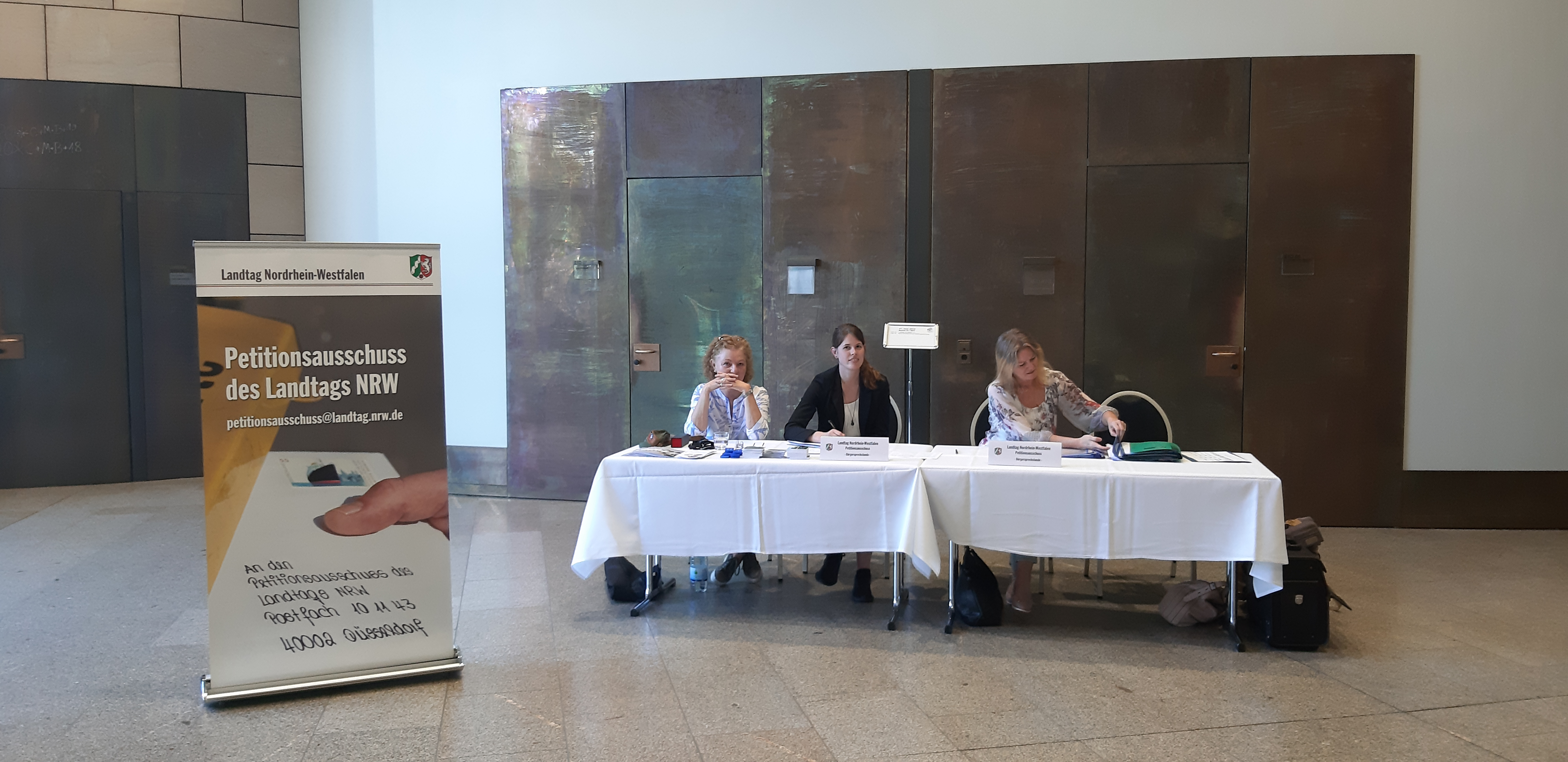 Bürgersprechstunde des Petitionsausschusses im Landtag NRW